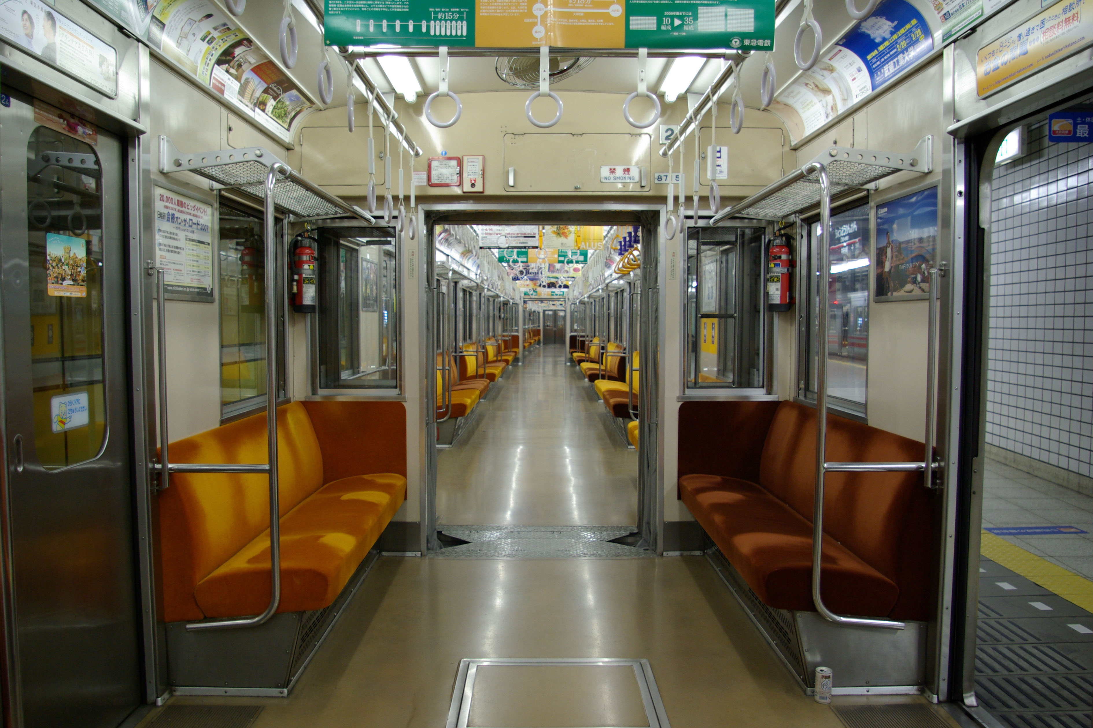 東急8500系電車 8715号の車内上り方連結面